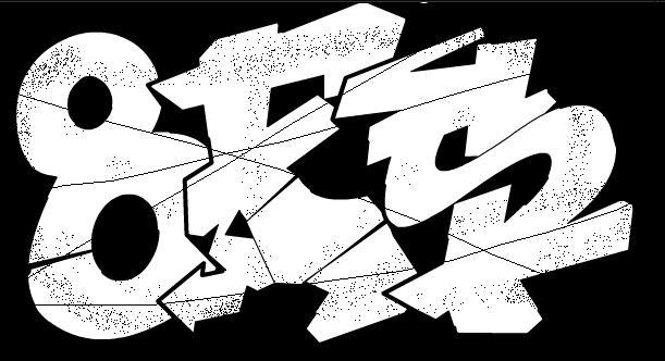 The 8 fake Steps,(8fs), banda portuguesa de Punk rock formada em 2007 em Portugal. formada pelo Ruben Tiago(guitarra/voz, Stewart Martins(guitarra/segunda voz), Ruben Duarte(baixo, segunda voz) e João Paulo(bateria). Para mais informações sobre este pessoal, visite o site da banda: The 8 fake steps (the8fs) is a portuguese band formed by 4 elements wich are Stewart Martins(guitar/back voice), João Paulo(drums), Ruben Duarte(bass/back voice) and last but not least Ruben Tiago(guitar/vocals). They started the band in 2007 and they play punk rock. For more information about this bunch of kids playing great rock, please visit their own website